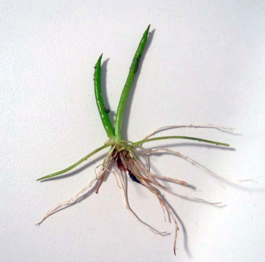 Europäischer Strandling Littorella uniflora, Müritz-Gebiet